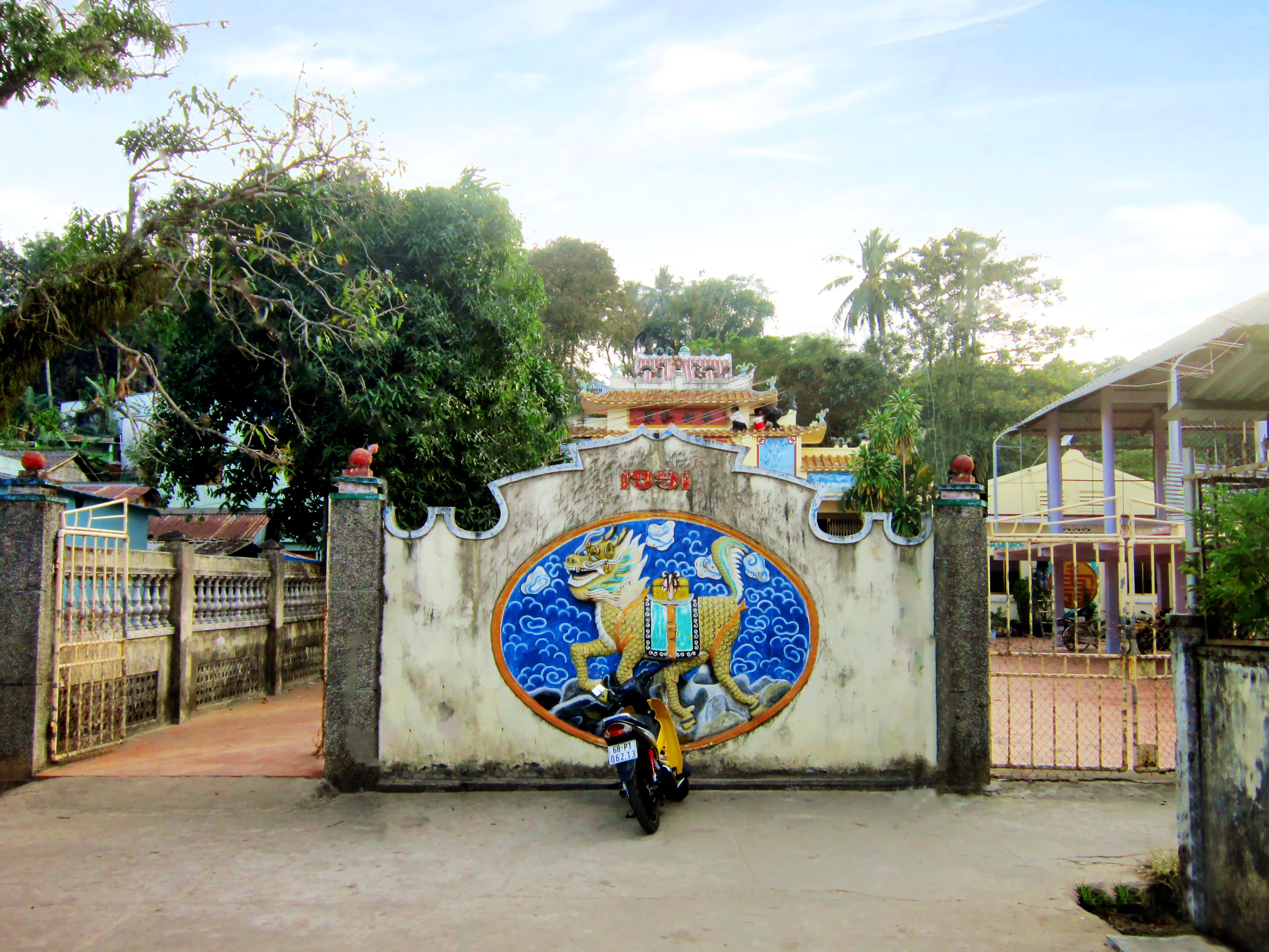 Đình thần Dương Đông tọa lạc trên đường 30 tháng 4, khu phố 1, thị trấn Dương Đông, huyện Phú Quốc, tỉnh Kiên Giang, Việt Nam.